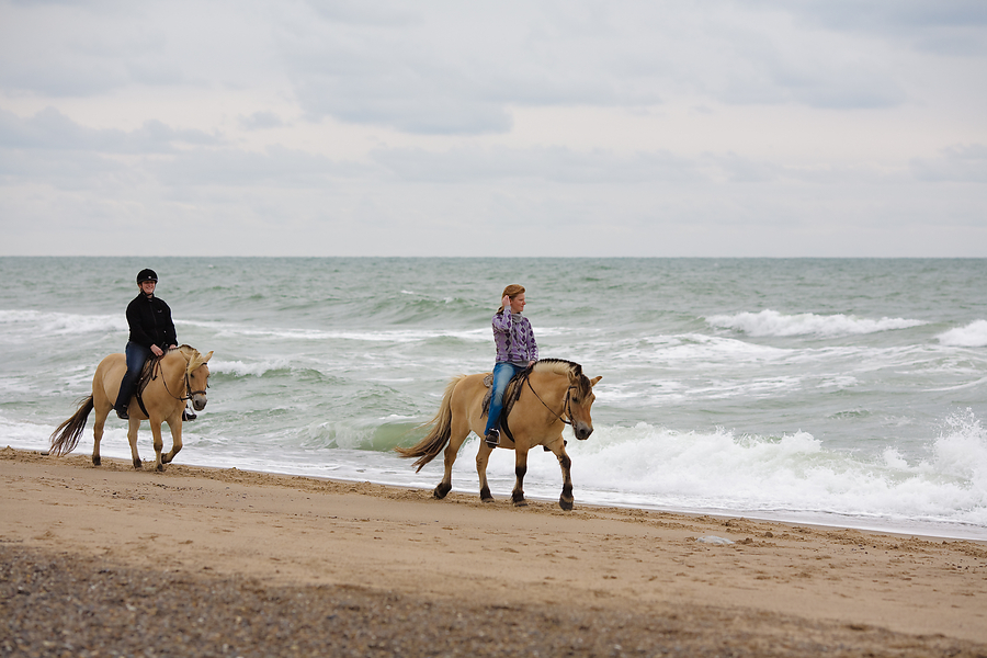 Norwegian fjord horse in Denmark